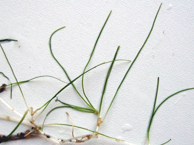 Sumpf-Teichfaden Zannichellia palustris, Müritz-Gebiet